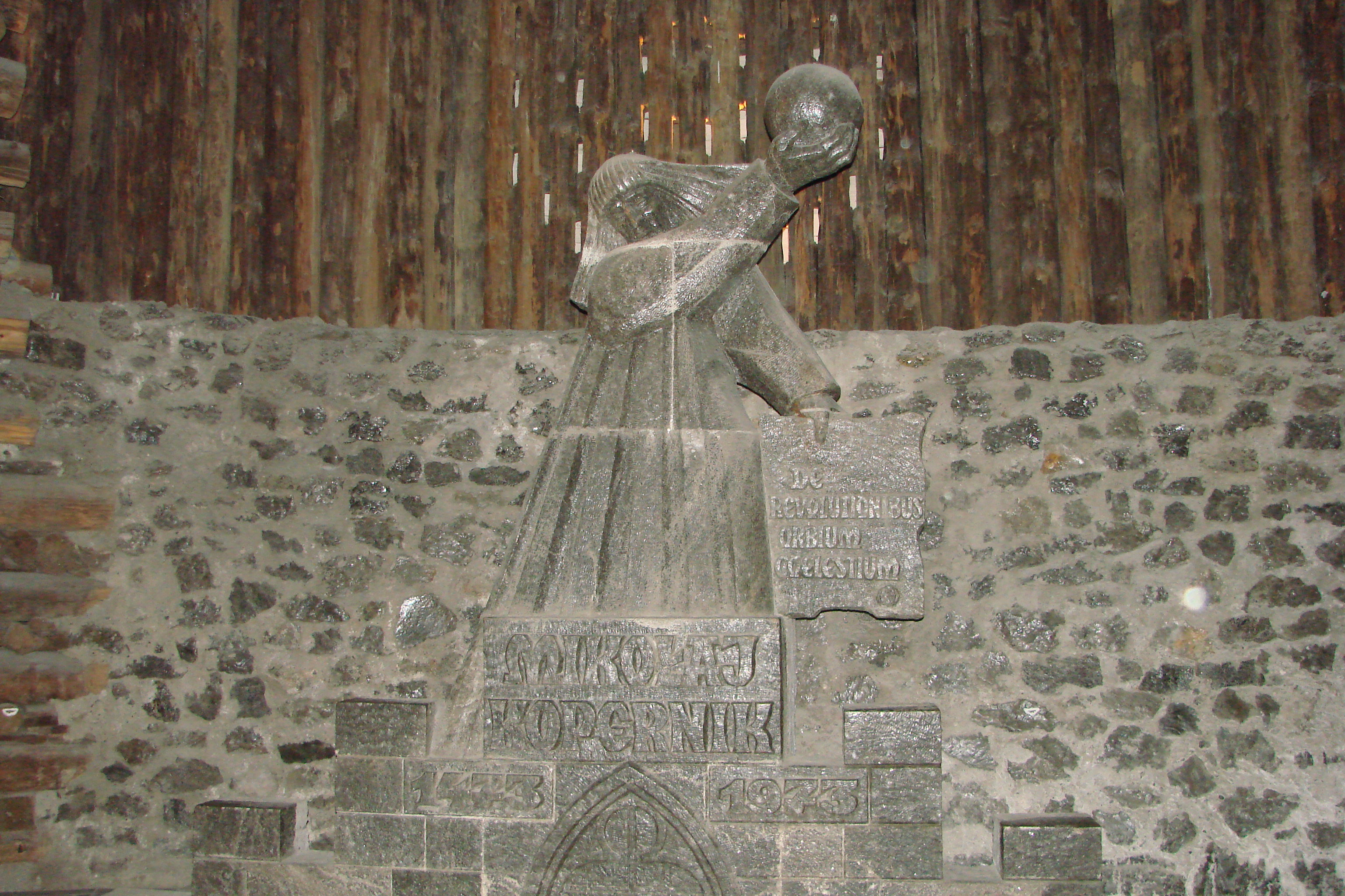 Wieliczka, Poland